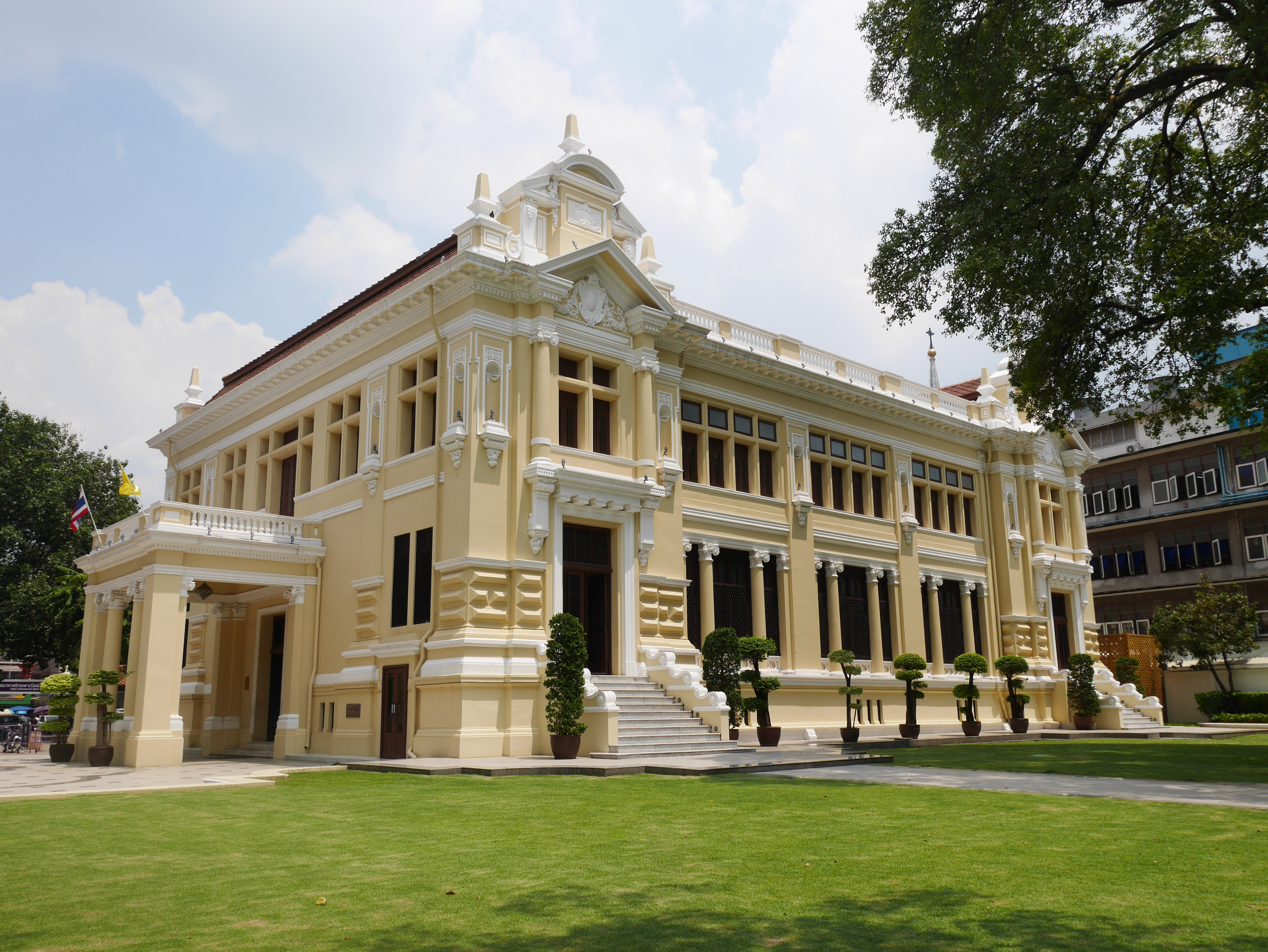 ธนาคารไทยพาณิชย์ สาขาตลาดน้อย